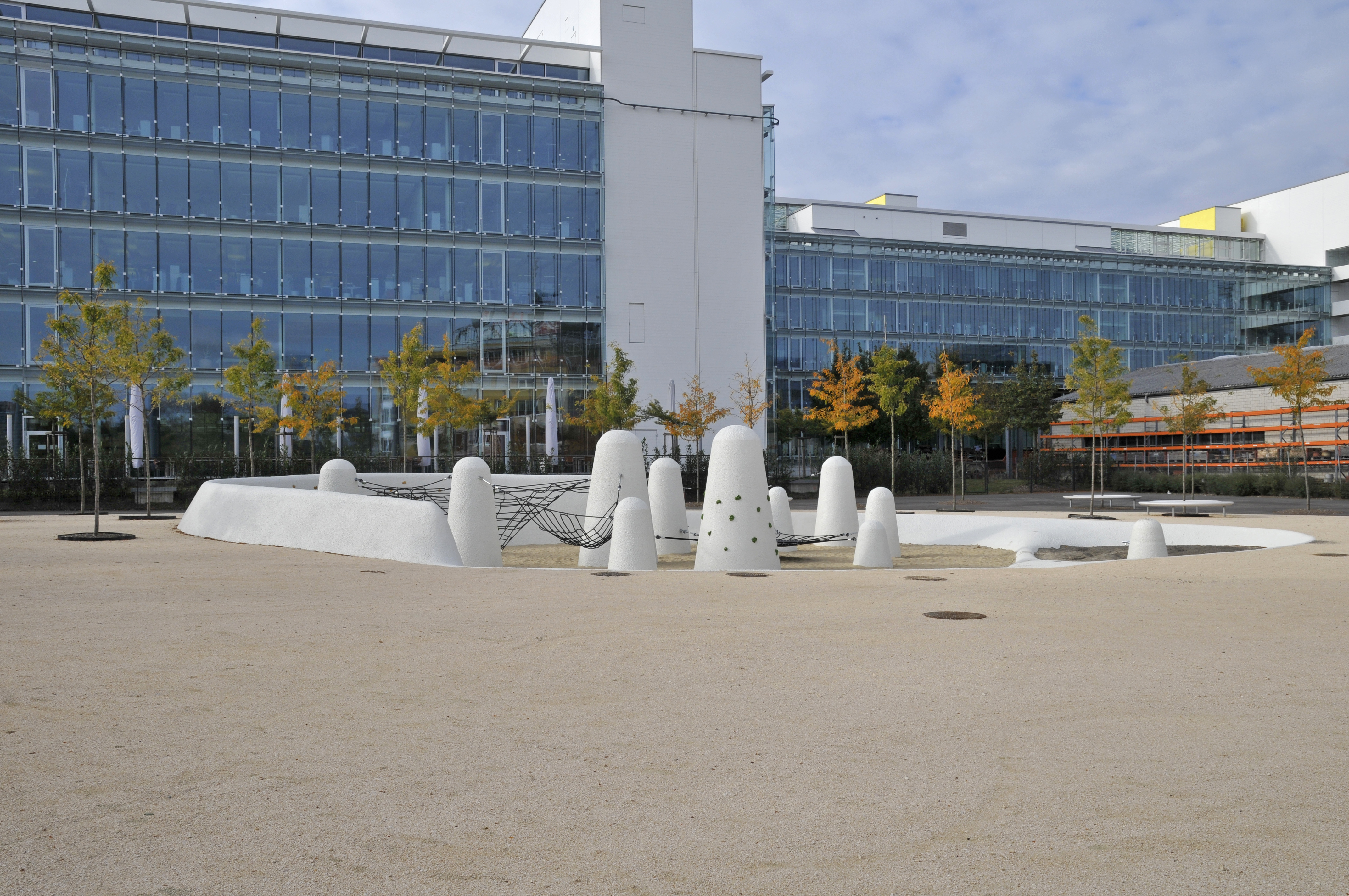 Die hügelige Spiellandschaft.